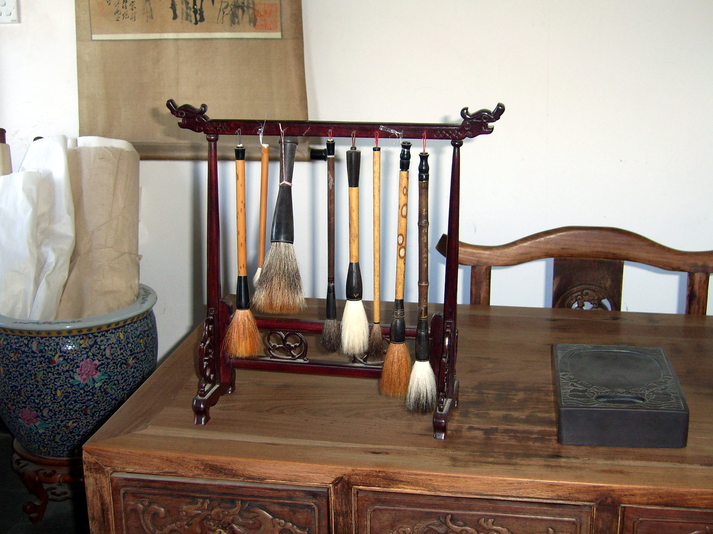 古时文人在书桌上挂这各种不同形制的毛笔，此为乾隆时期的原貌，摄于香山公园